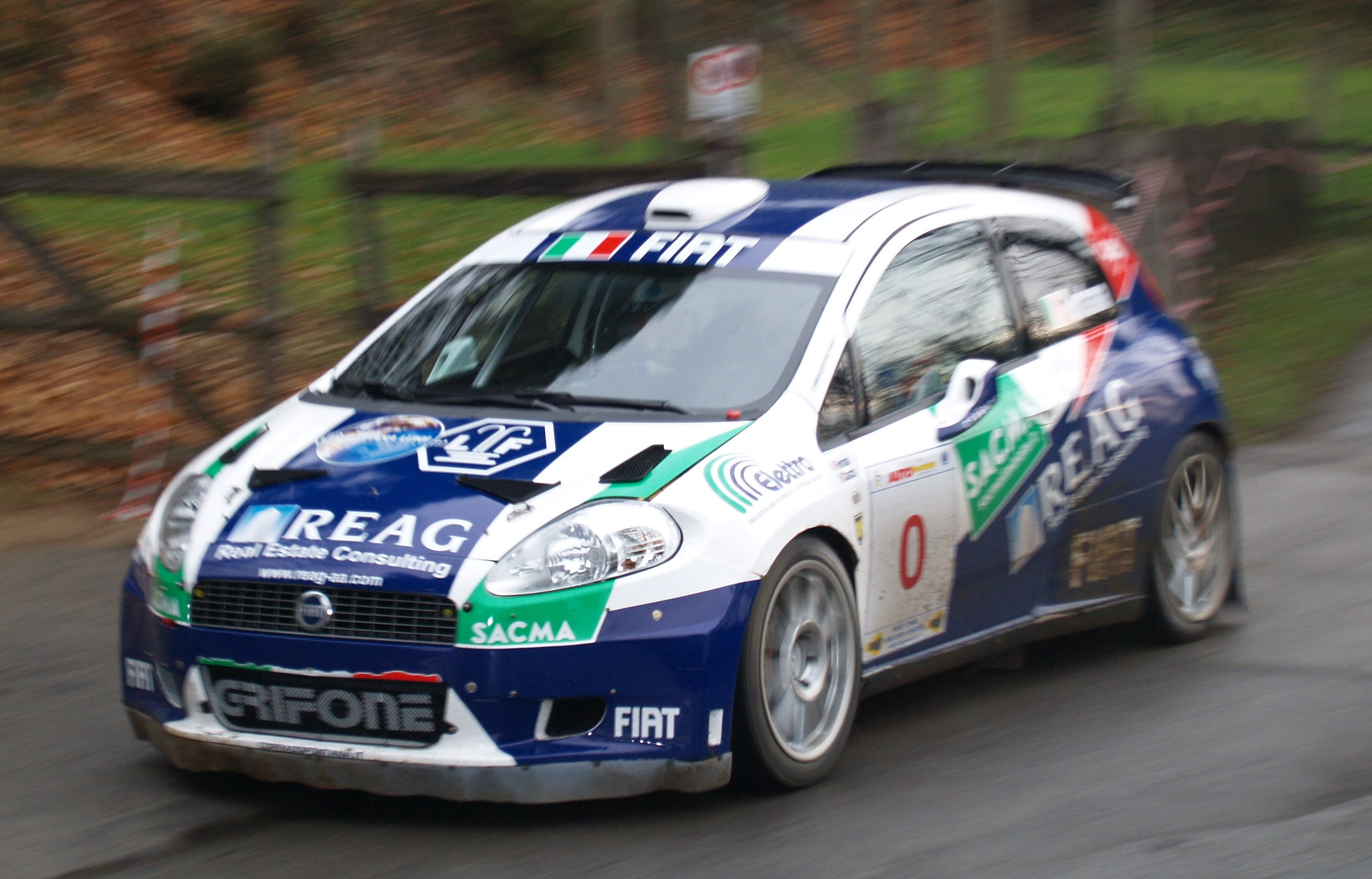 Fiat Grande Punto Super 2000 che condotta da Corrado Fontana parteciperà al Campionato Europeo 2007.